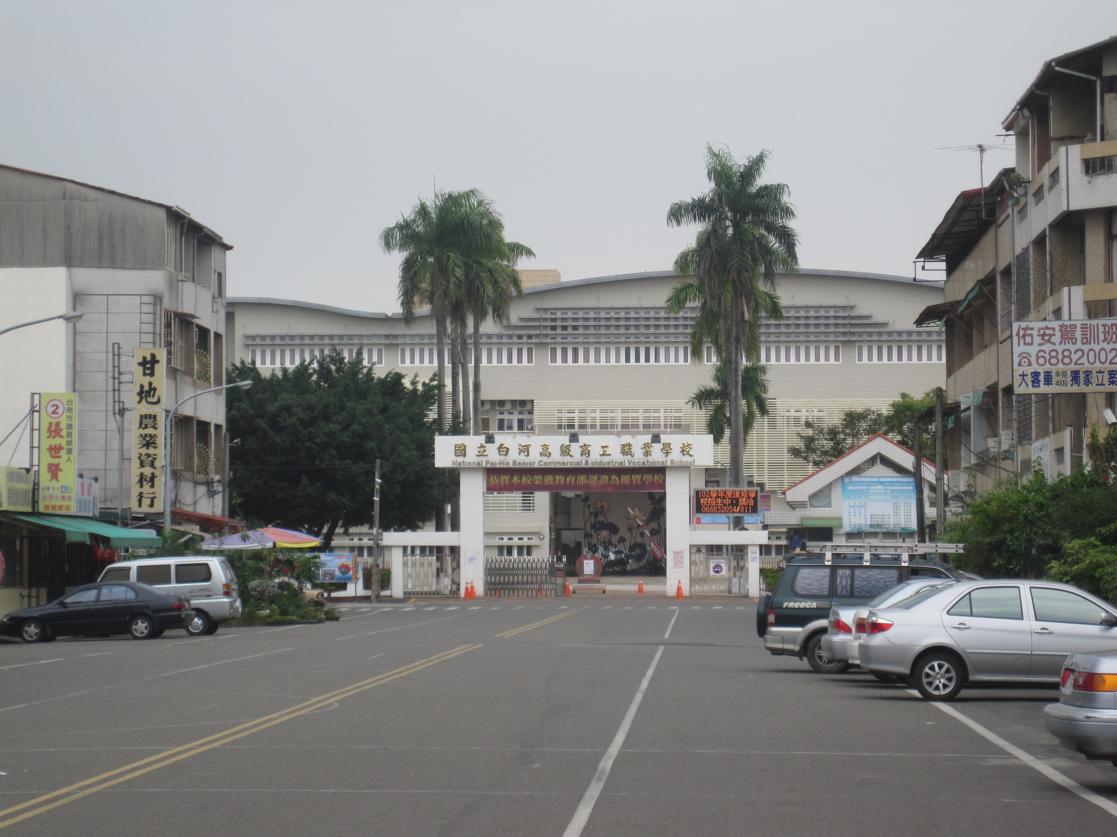 國立白河高級商工職業學校